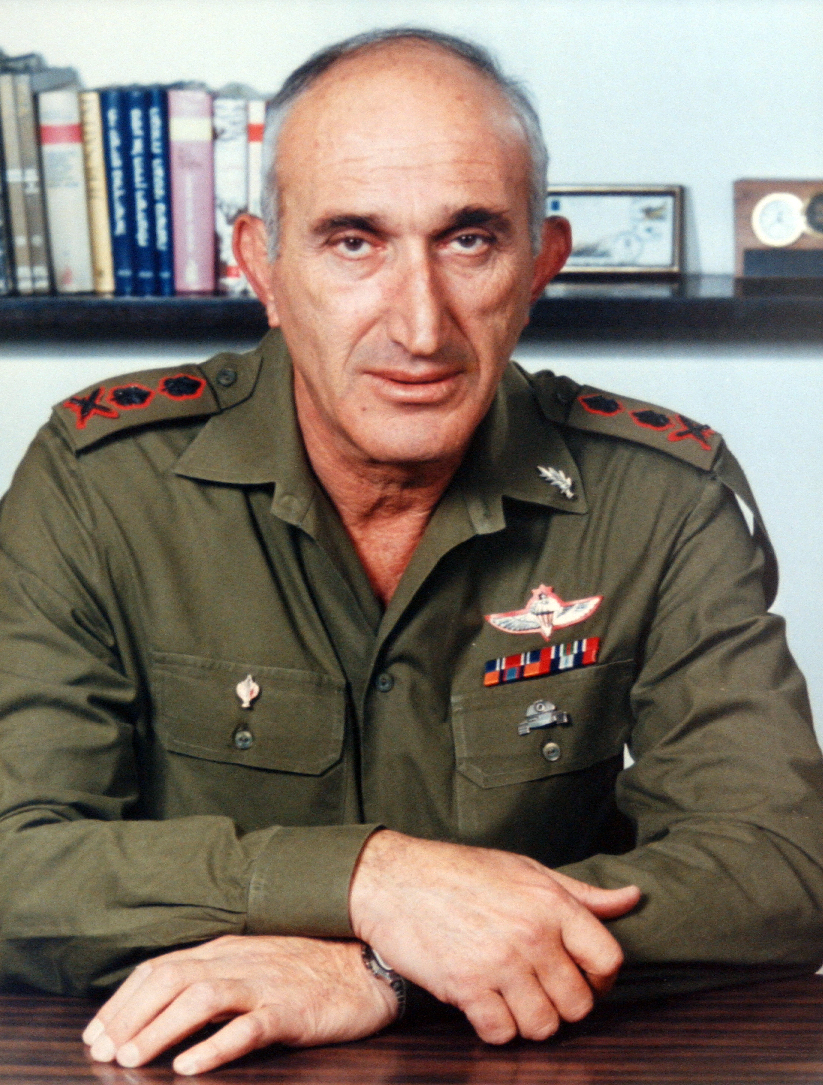 הרמטכ"ל רא"ל משה לוי.